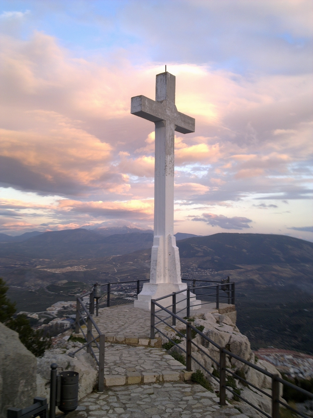 Cruz del Castillo de Santa Catalina de Jaén.